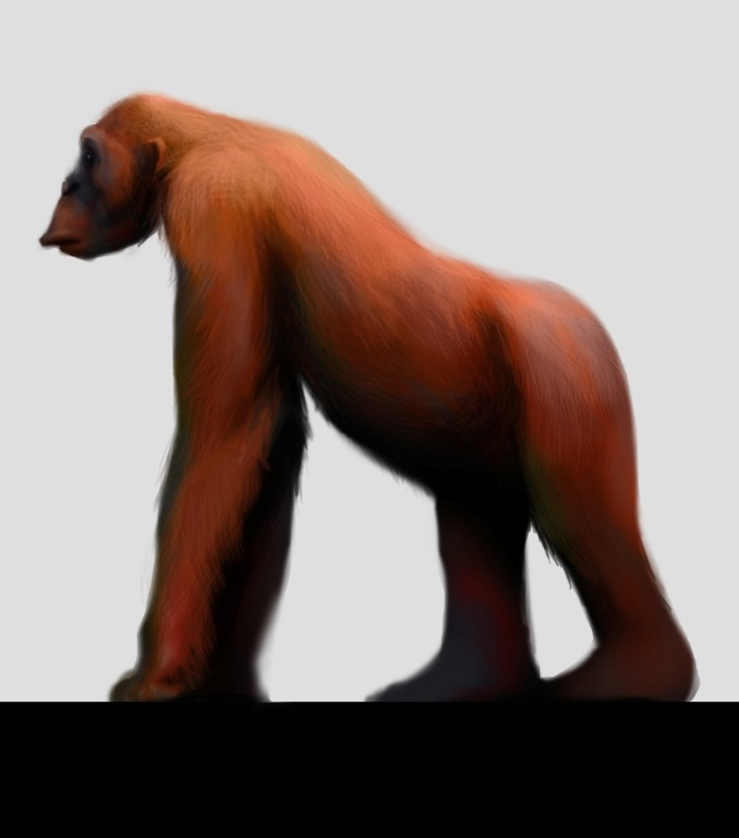 Visión artística de la posible apariencia de un Gigantopithecus